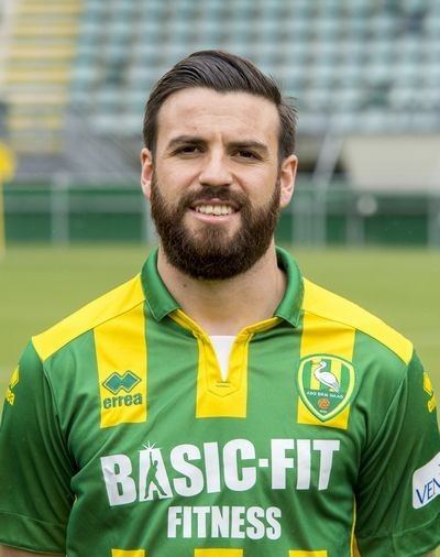 José San Román